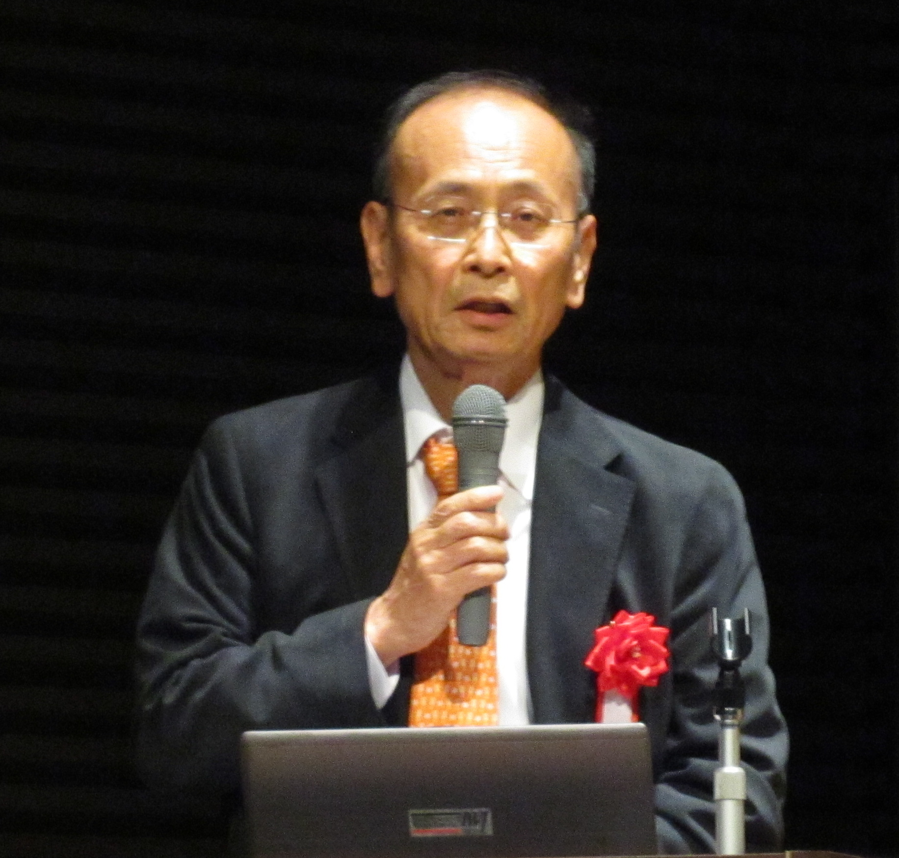 題名：演説中の孫崎享氏（元外務省国際情報局局長） 場所：「饗宴IV」Grand Hall(品川) 日時：2013年12月22日(日)